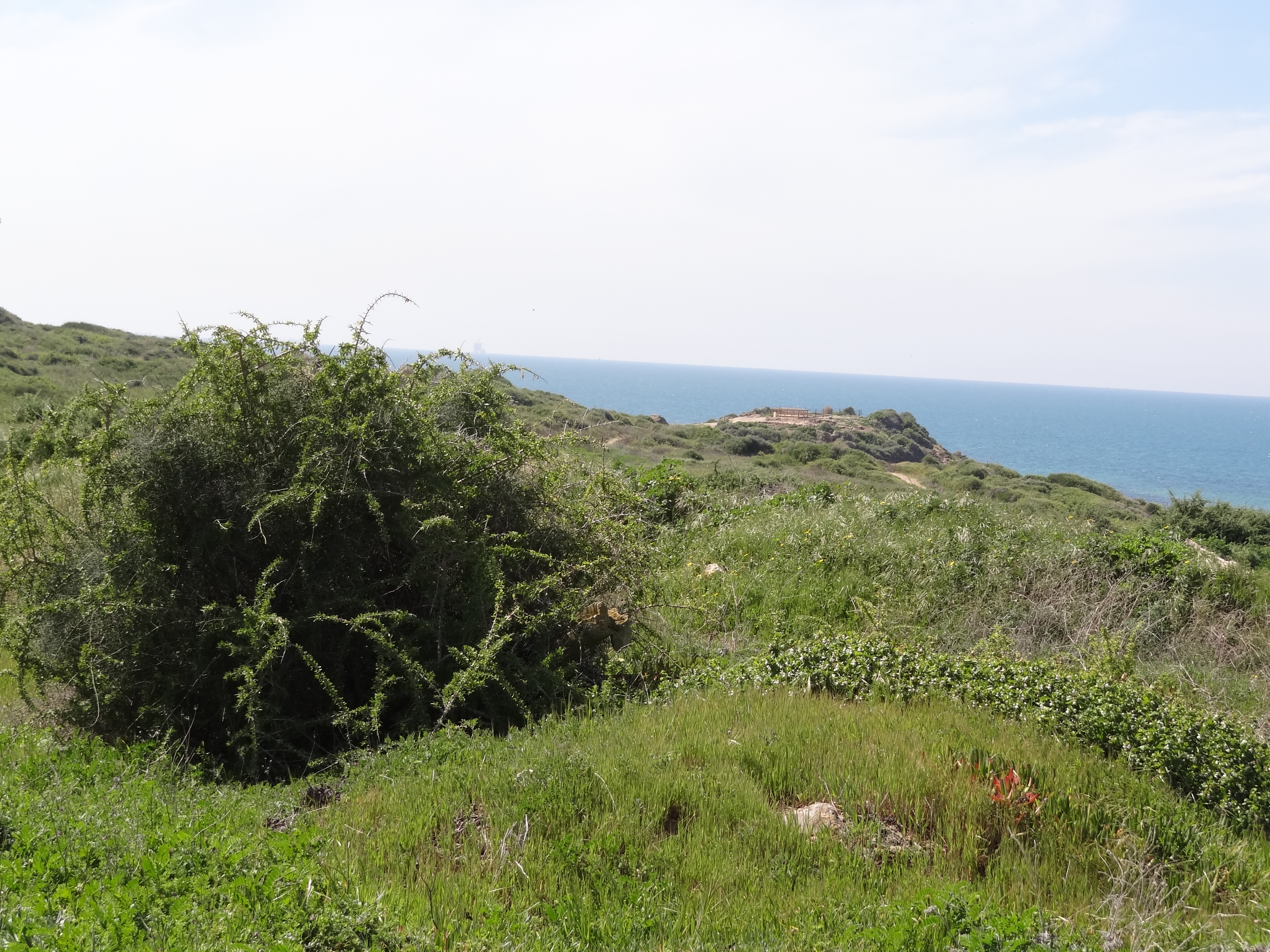 Yavne-Yam is an archaeological site located on Israel's southern Mediterranean coast יבנה-ים הייתה עיר נמל עתיקה בארץ ישראל. יישוב משגשג, אחת מערי הנמל החשובות שמדרום ליפו. האתר ארכאולוגי שוכן על גבי תל בגן הלאומי חוף פלמחים.